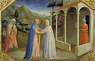 Angelico, predella dell'annunciazione 02 visitazione